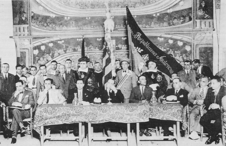 Acte a favor de l'estatut a Sueca. Junt a la senyera coronada, la bandera del PURA.